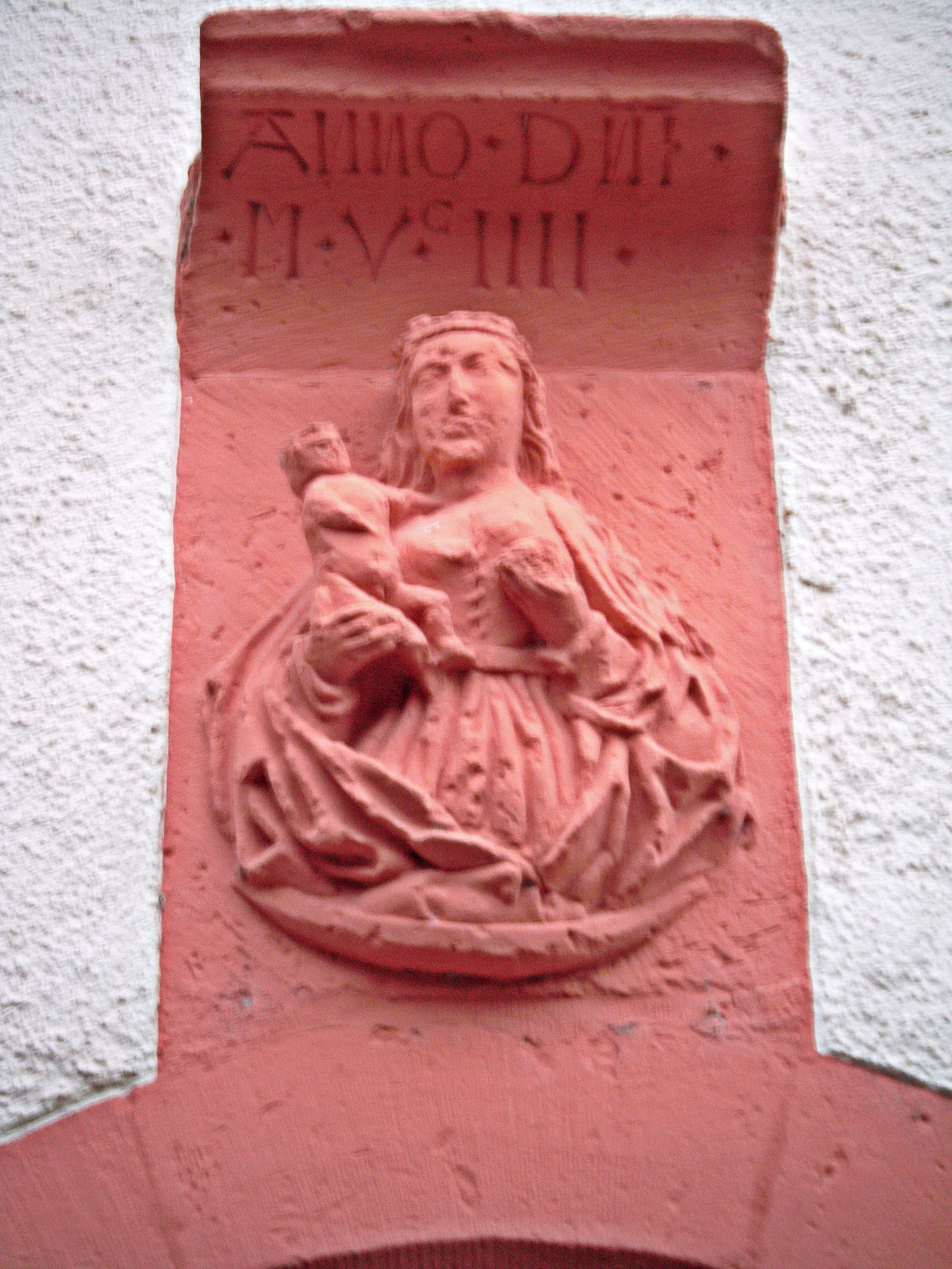 Kath. Kirche St. Valentin (früher St. Martin), Mertesheim, gotische Muttergottes mit Bauinschrift (1504), über dem Hauptportal